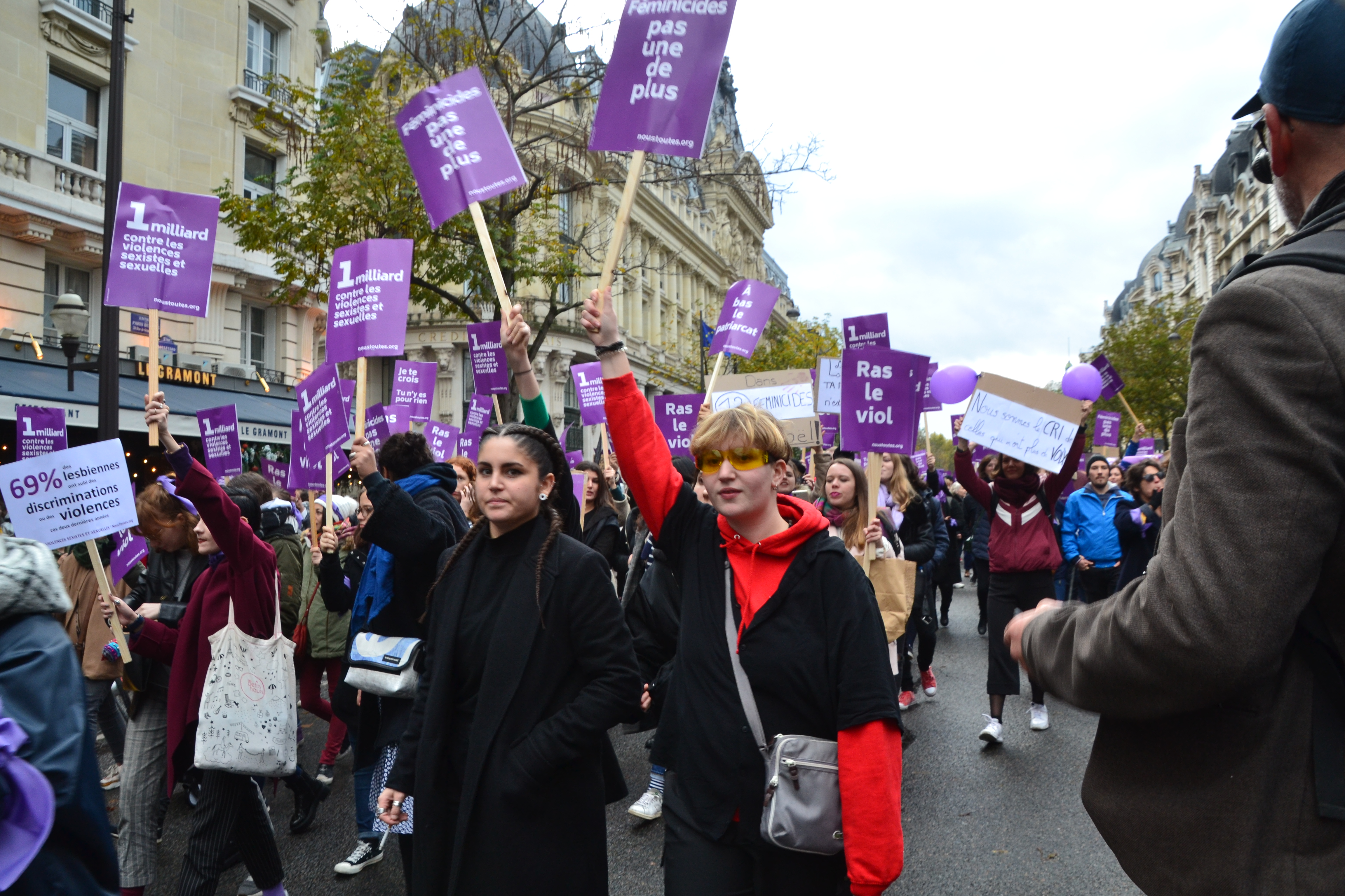 Une énorme mobilisation. Entre 50.000 et 100.000 personnes à Paris pour ce 23 novembre 2019 March against sexist violences and sexual violence. A huge mobilization. Between 50,000 and 100,000 people in Paris - 23 November 2019